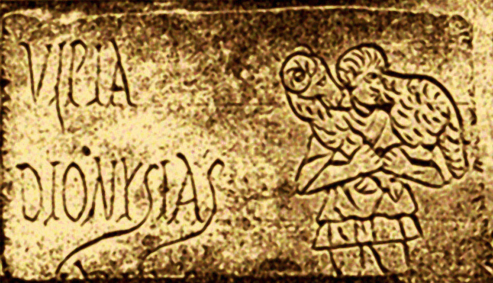 Dionysos Le Bon Pasteur d'Alexandrie